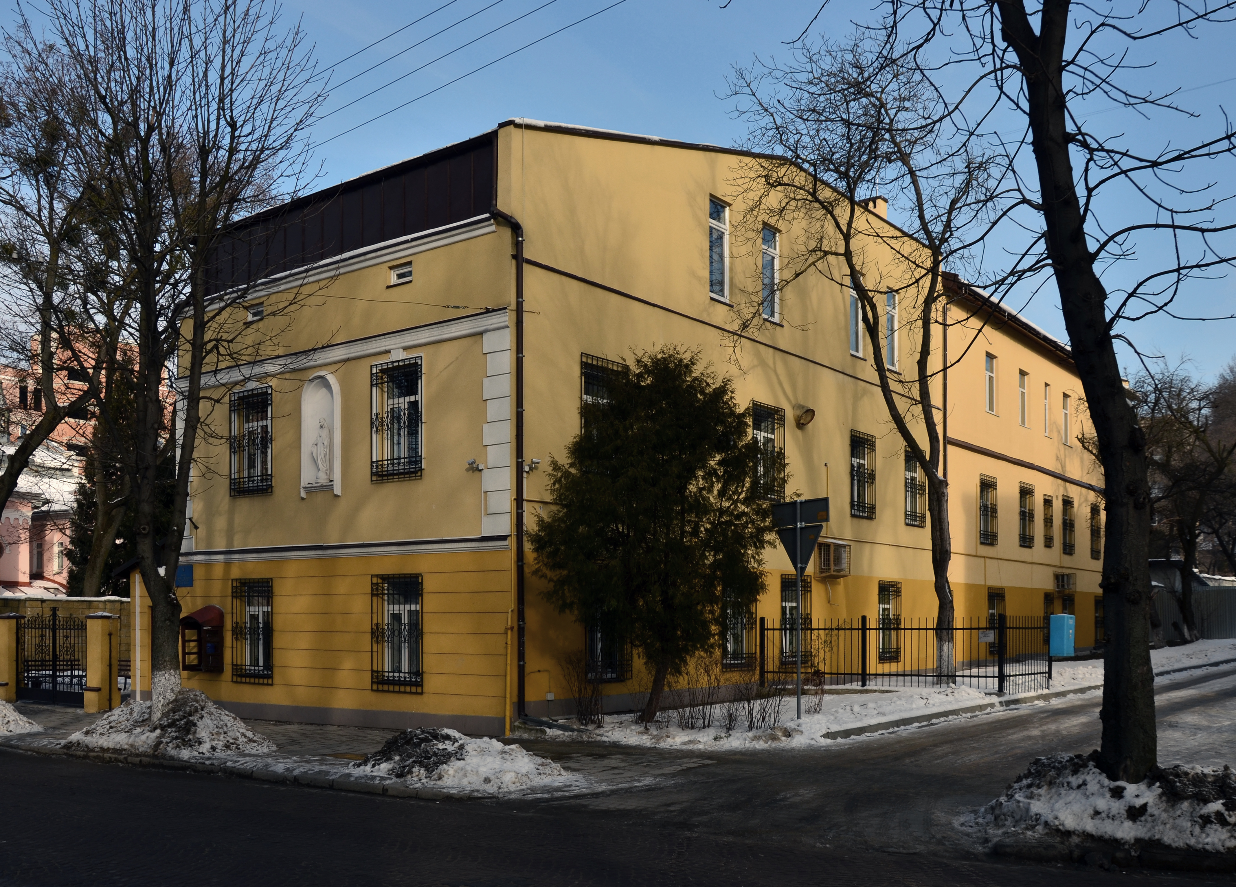 Будинок № 61 на вулиці Пекарській у Львові.